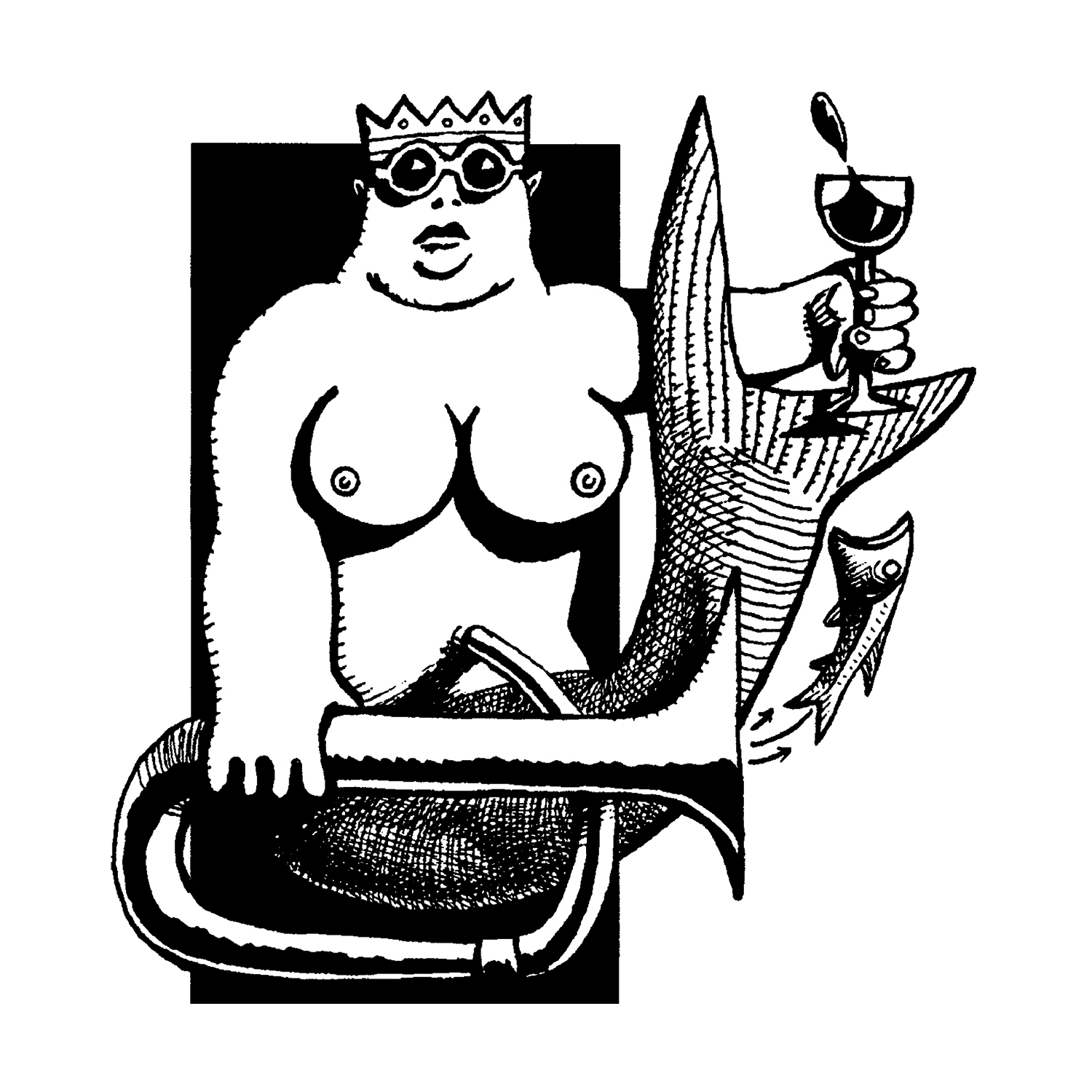 Logo de la Fanfare des Beaux-Arts depuis 2002 (source GMBA).